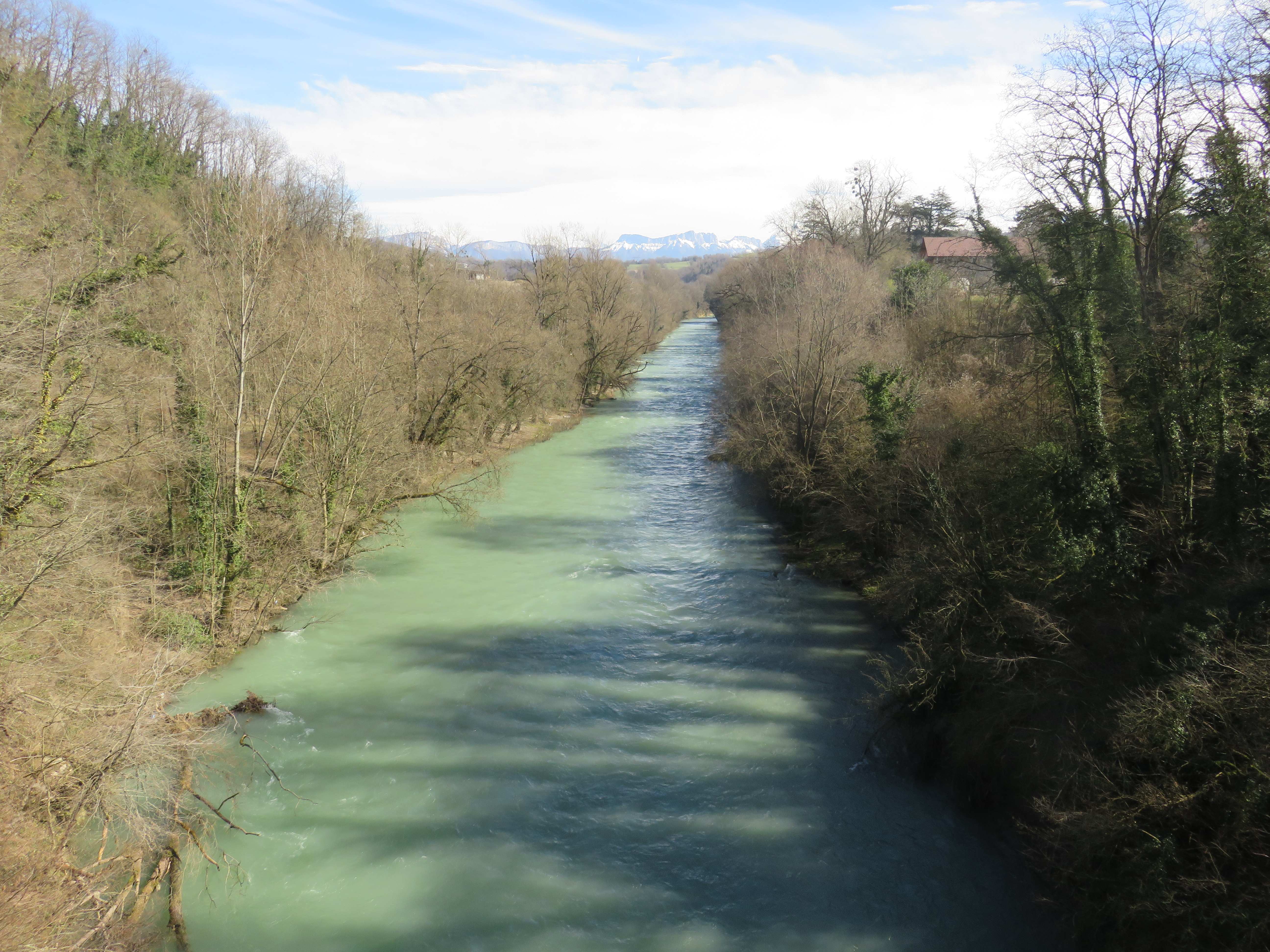 Le Fier (Hauteville-sur-Fier, France) le 8 mars 2020.